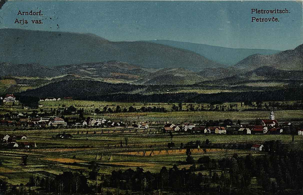 Razglednica Arje vasi.